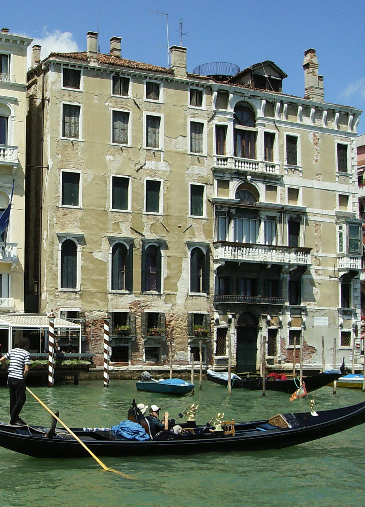 pal treves de bonfili venise